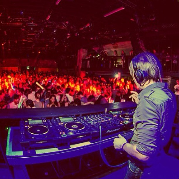 Roma Pafos во время выступления